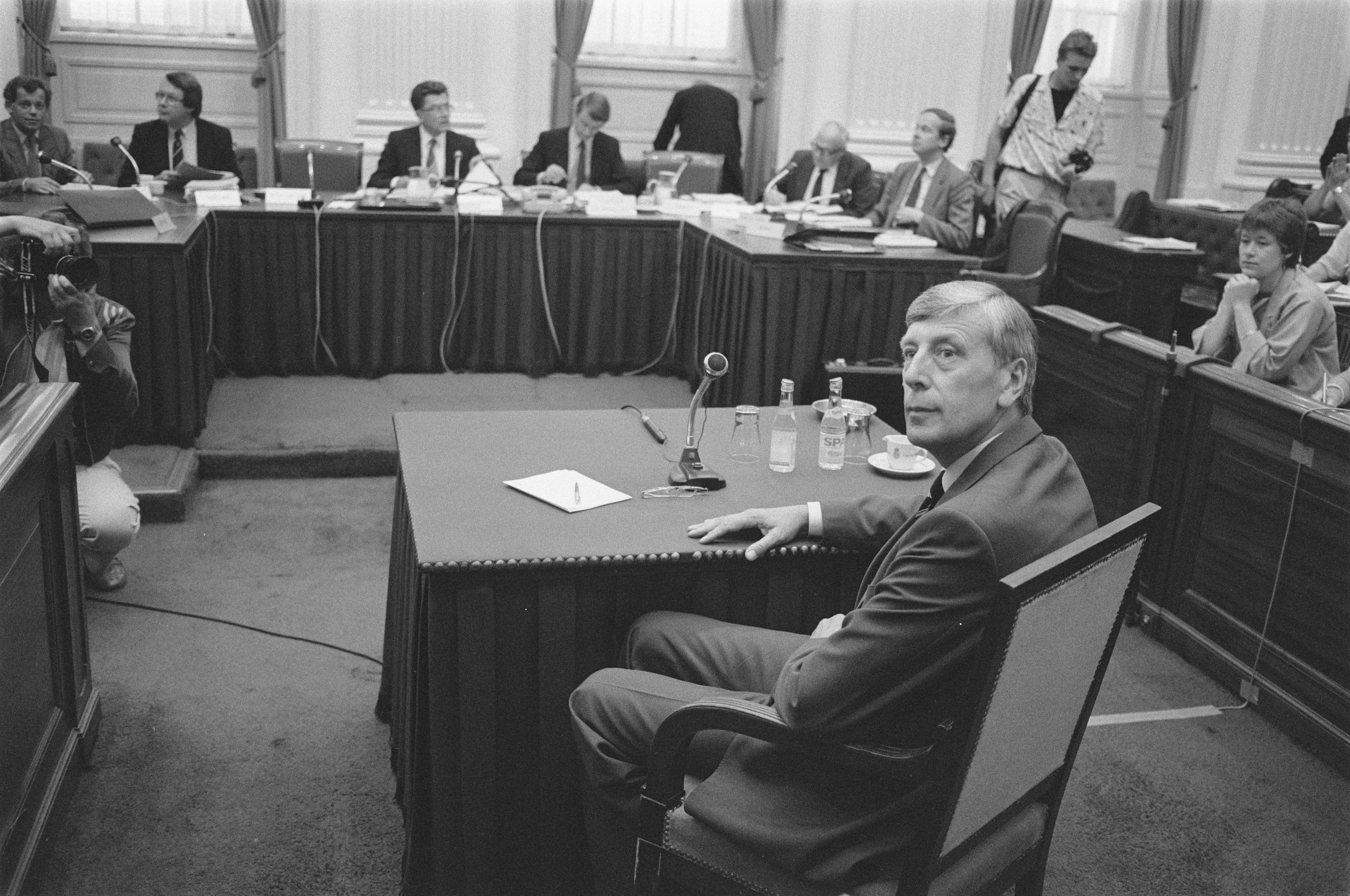 Collectie / Archief : Fotocollectie Anefo Reportage / Serie : [ onbekend ] Beschrijving : Parlementaire enquete RSV; De Geus Datum : 10 juli 1984 Locatie : Den Haag, Zuid-Holland Trefwoorden : parlementaire enquêtes Persoonsnaam : Geus, P.B.R. de Instellingsnaam : RSV Fotograaf : Bogaerts, Rob / Anefo Auteursrechthebbende : Nationaal Archief Materiaalsoort : Negatief (zwart/wit) Nummer archiefinventaris : bekijk toegang 2.24.01.05 Bestanddeelnummer : 933-0294